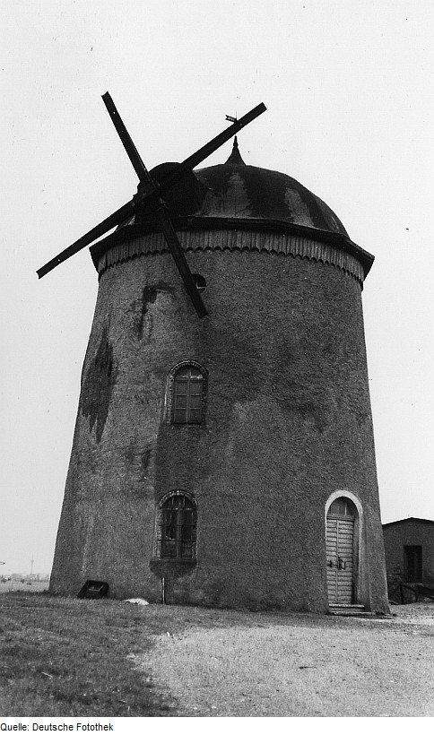 Original image description from the Deutsche FotothekZeithain-Moritz. Turmholländermühle